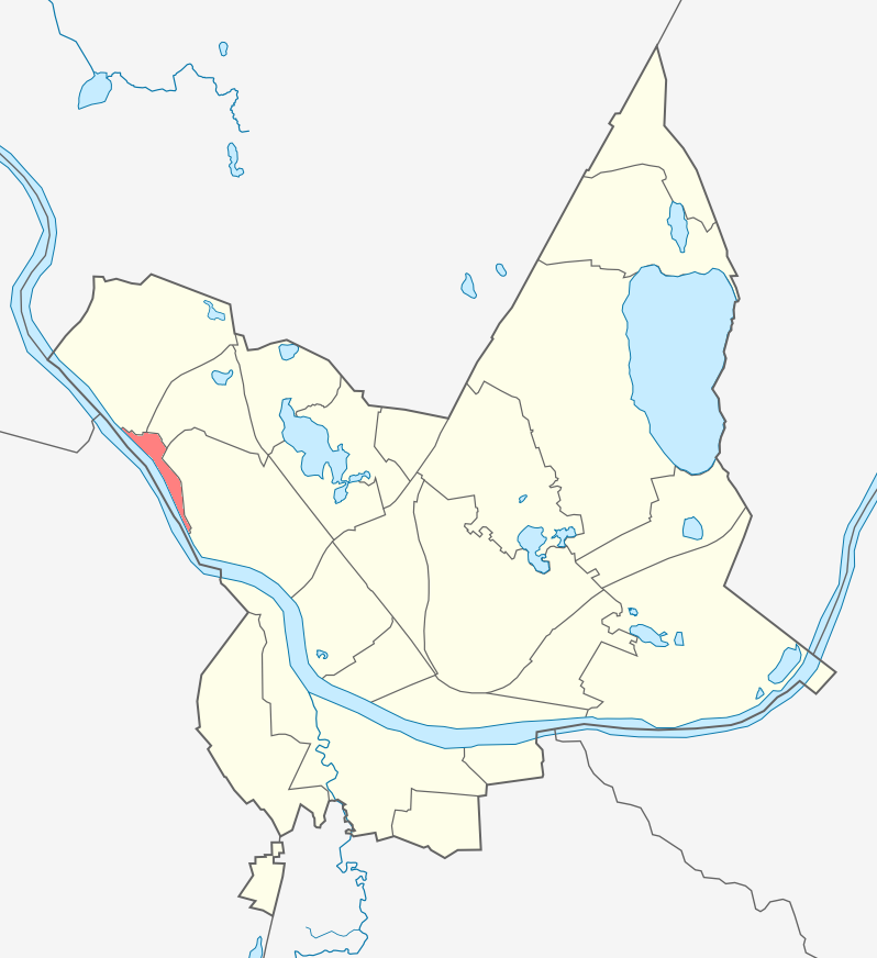 Микрорайон Дзинтари карте Даугавпилса.